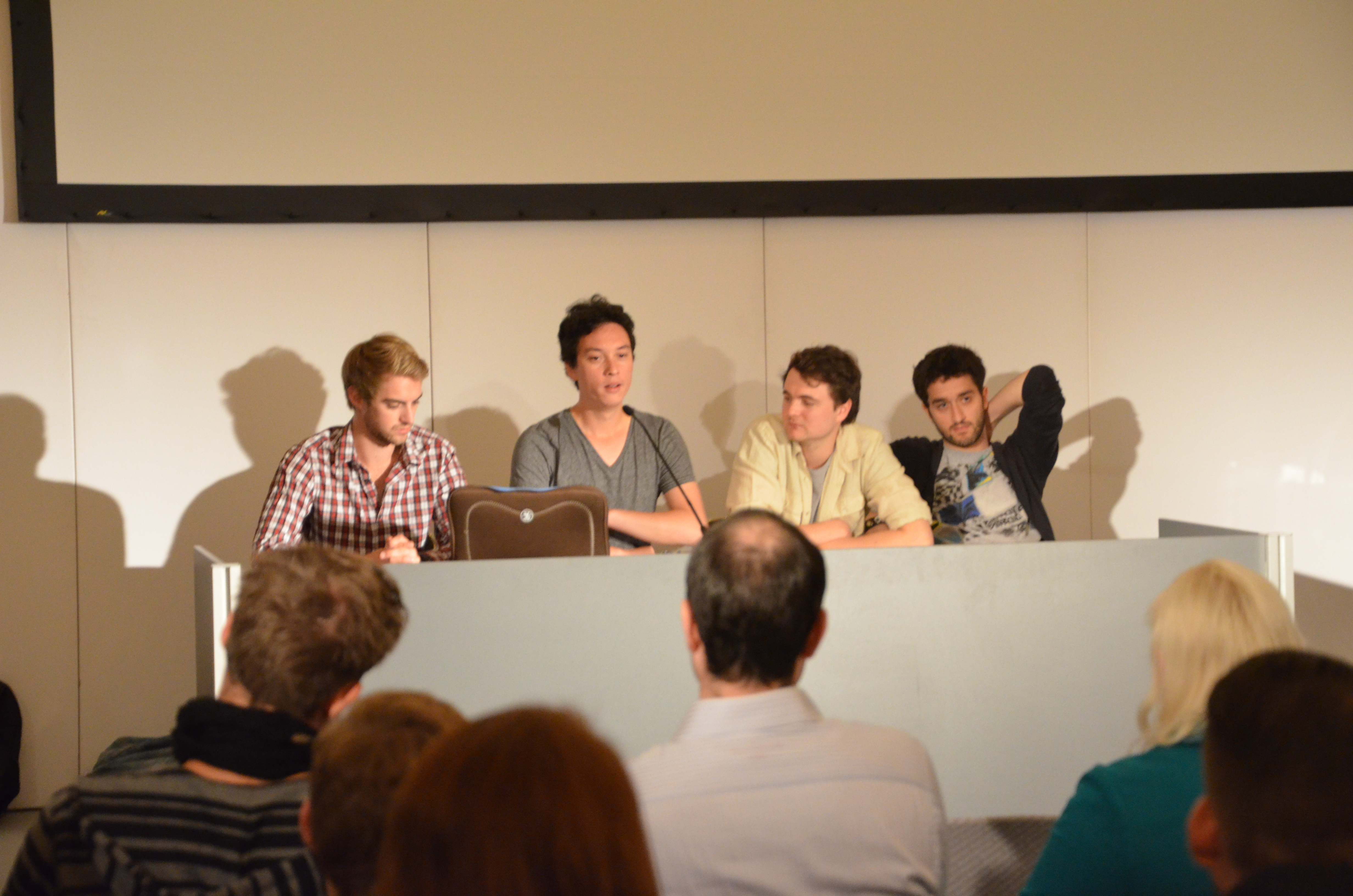 Y-Titty und The Emu auf der VideoDay 2013 Academy in Köln